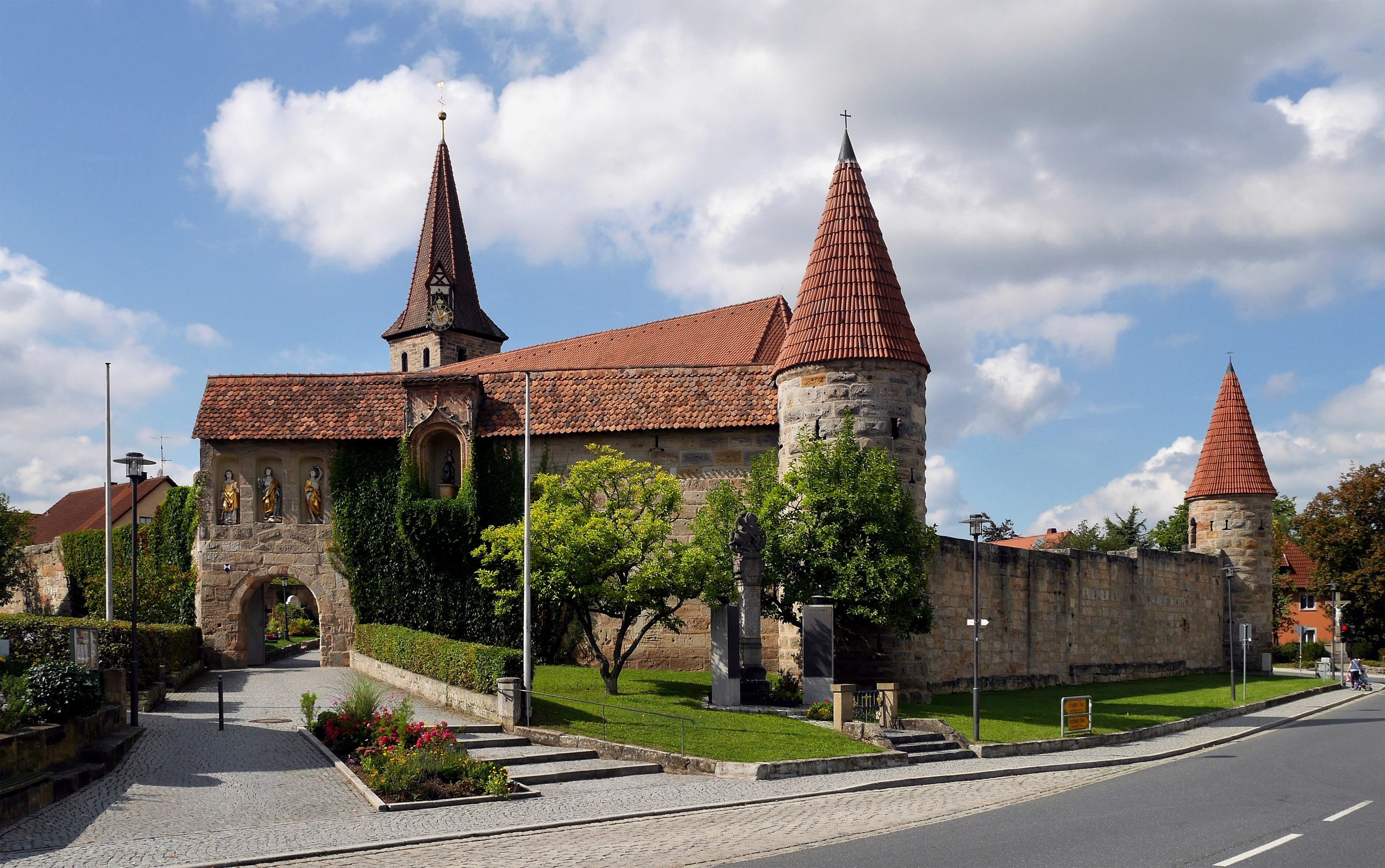 Die Kirchenburg Effeltrich befindet sich mitten in Effeltrich, 20 km nördlich von Nürnberg. Die Kirchenburg wurde gegen Ende des 15. Jahrhunderts als Wehrkirche erbaut. Sie zählt mit einer Mauerlänge von 200 m, 4 Wehrtürmen und einem begehbaren Wehrgang zu den am besten erhaltenen Wehrkirchen in Oberfranken.